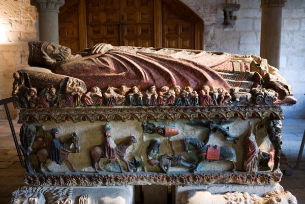 Sepulcro antiguo (s. XIII) de San Pedro de Osma (Catedral de El Burgo de Osma)